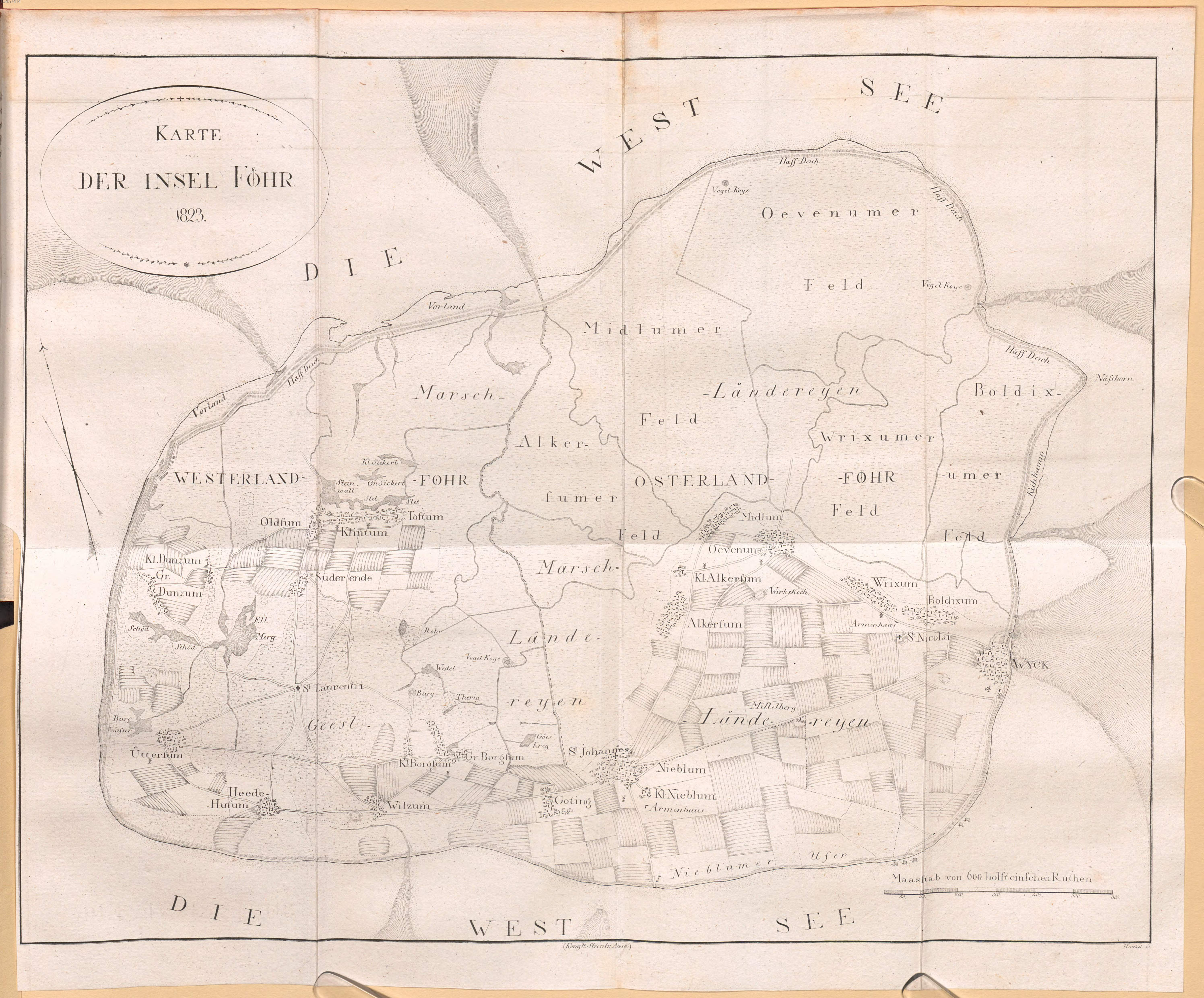 Karte der Insel Föhr, Nordfriesische Inseln. Teil des Buches: Friedrich von Warnstedt: Die Insel Föhr und das Wilhelminen See-Bad, Schleswig 1824